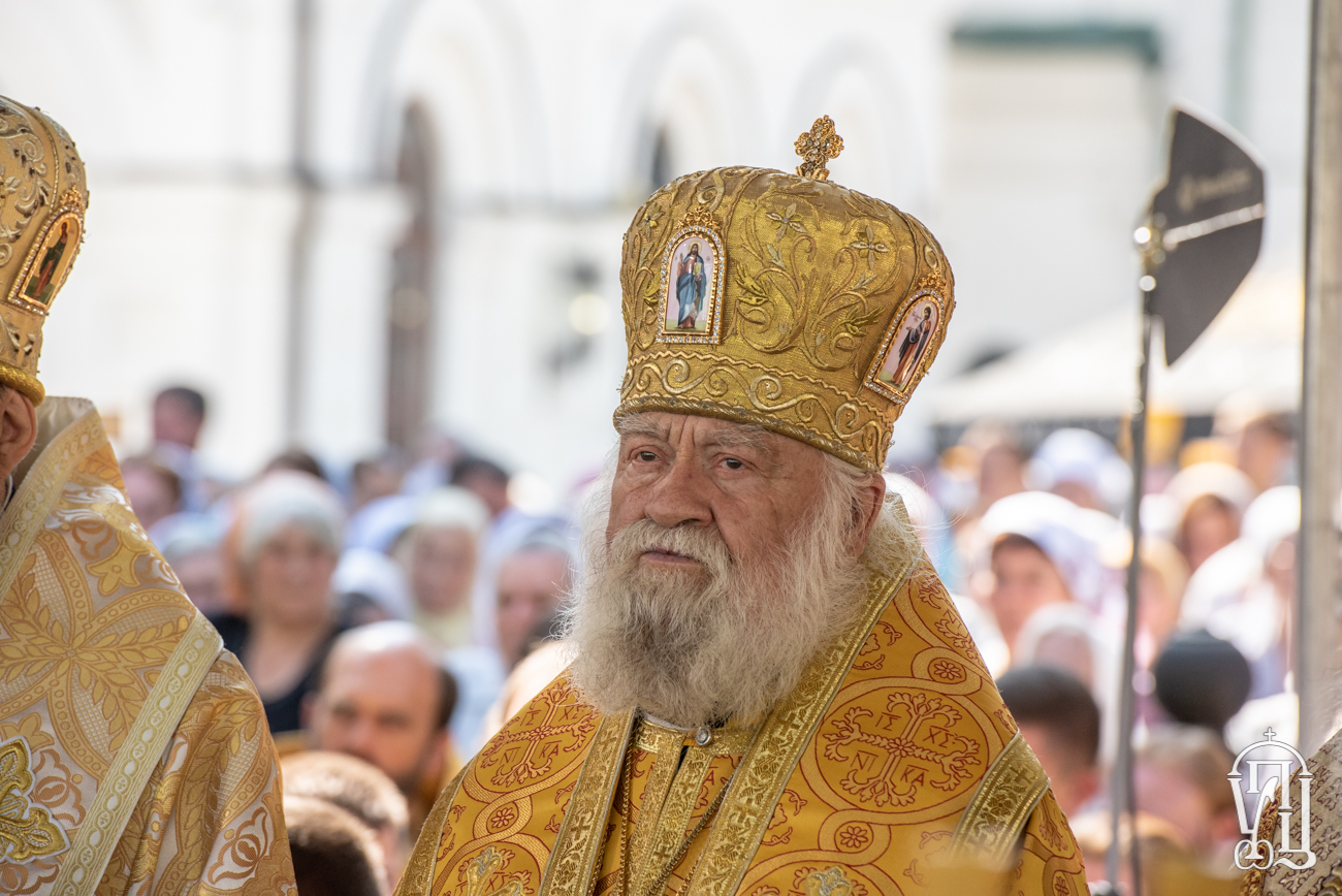 Літургія-князя-Володимира-40